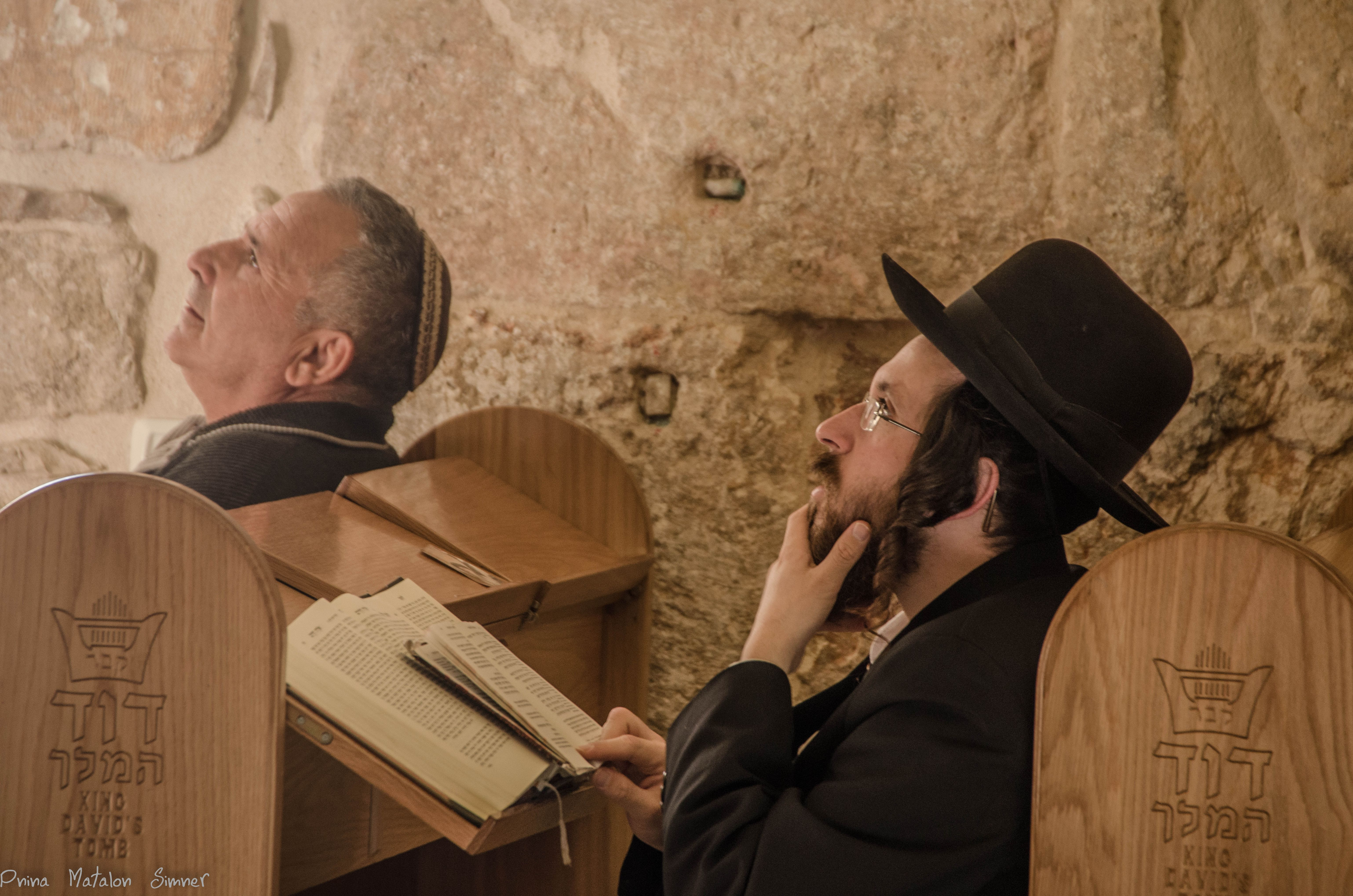 קבר דוד המלך הוא מבנה בהר ציון שבירושלים, בו על פי המסורת העממית היהודית, המוסלמית, כמו גם הנוצרית קבור דוד המלך. המסורת הנוצרית מוסיפה ורואה בקומה השנייה של המבנה את חדר הסעודה האחרונה, בה סעדו ישו ותלמידיו לפני שנלקח אל מותו. אתר זה, המקודש לשלוש הדתות, היה לנקודת מגע וחיכוך ביניהן במשך השנים..